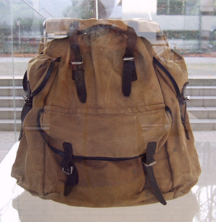 Svetlana + Igor Kopystiansky: Verstecktes Radio (2004)